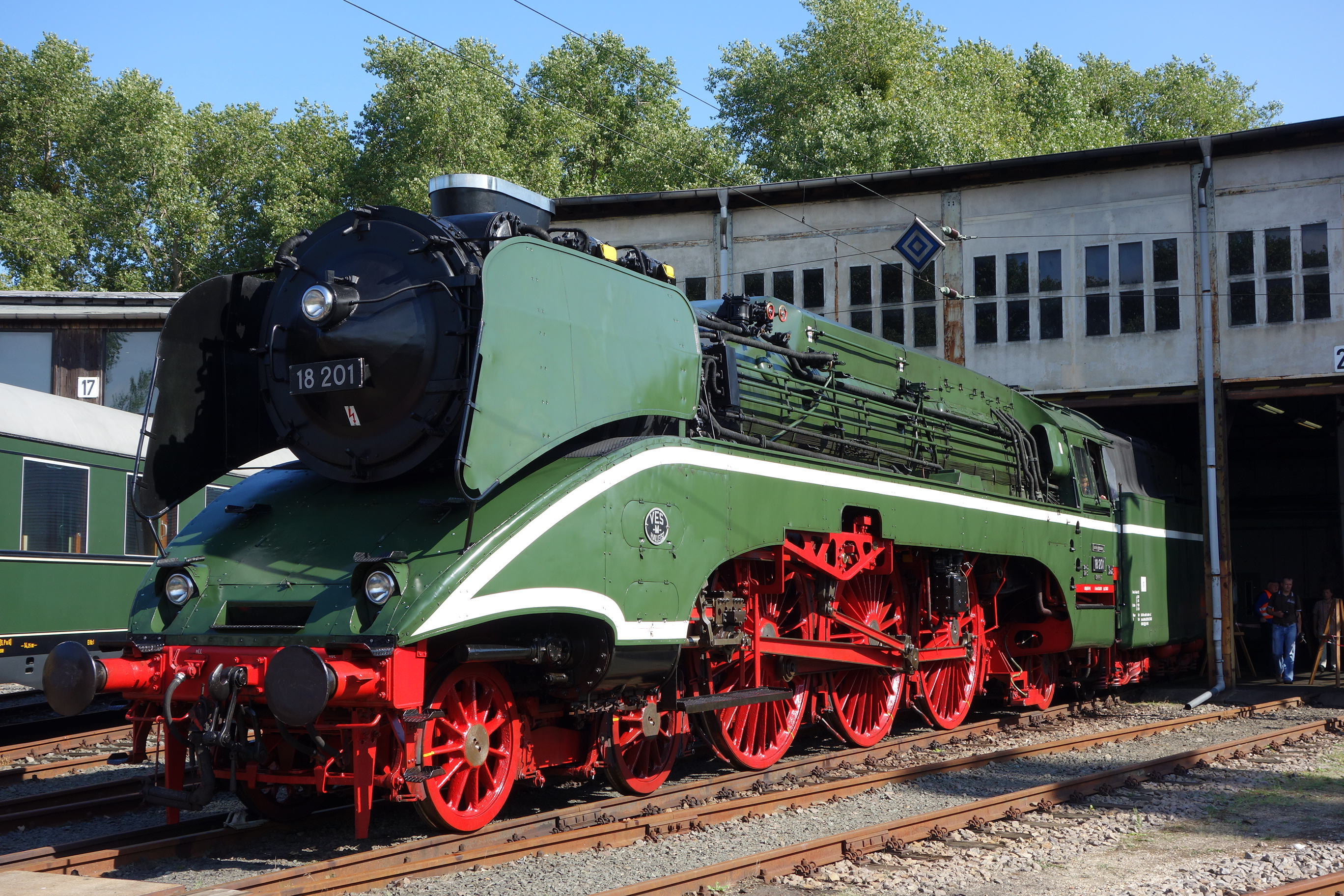 Bahnbetriebswerk Lutherstadt Wittenberg, Dampflok 18 201